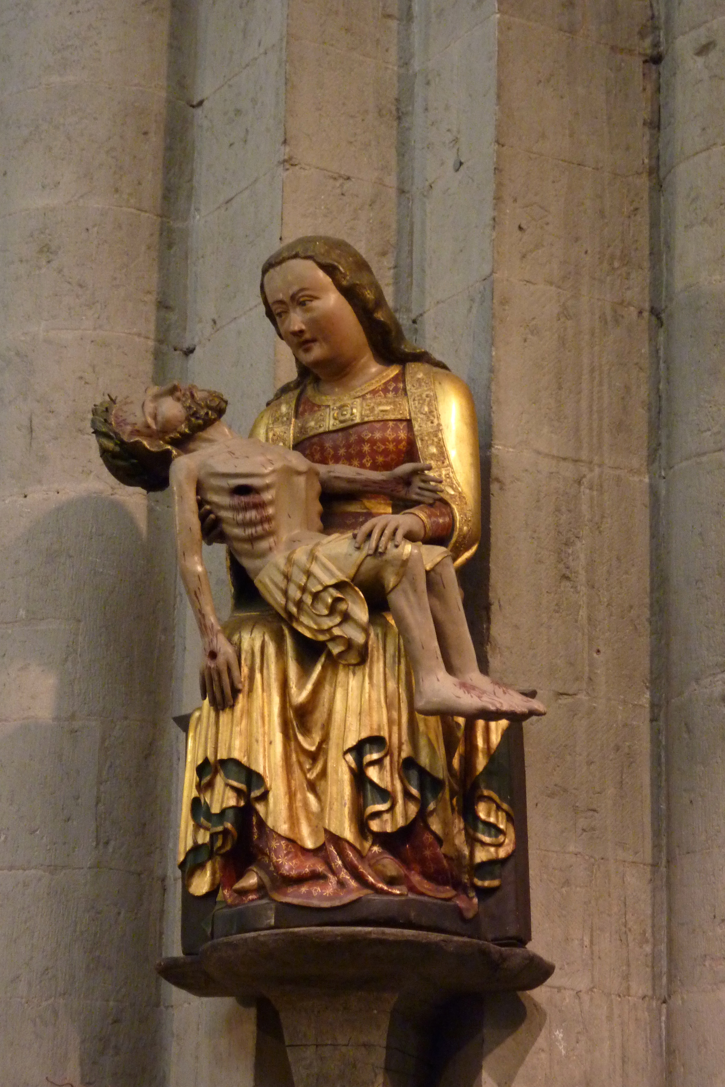 Katholische Kirche St. Maria Magdalena und St. Andreas des ehemaligen Prämonstratenser-Klosters Knechtsteden in Dormagen im Rhein-Kreis Neuss (Nordrhein-Westfalen), Pietà am südwestlichen Vierungspfeiler, aus dem 14. Jahrhundert